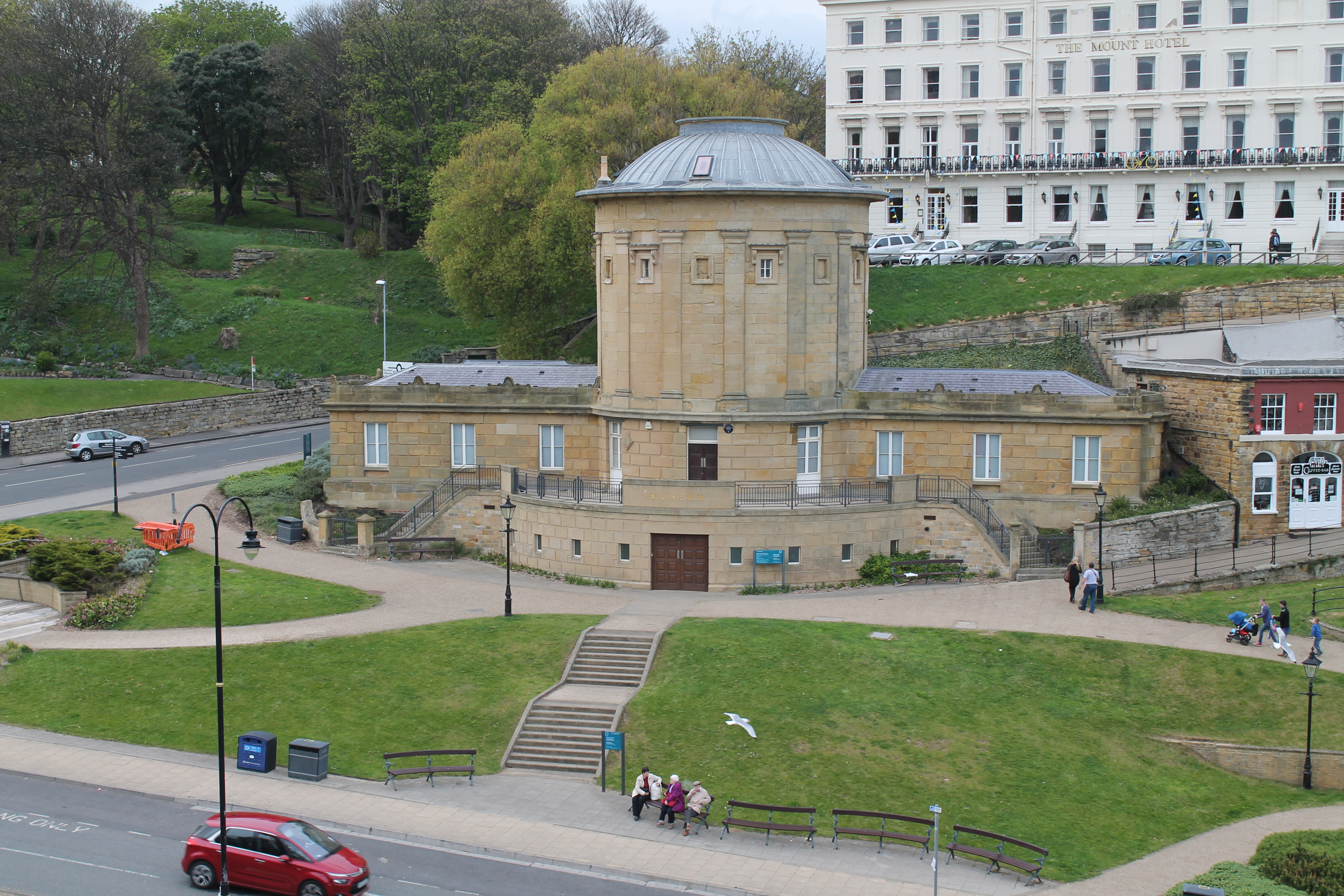 Musée de Sacarborough